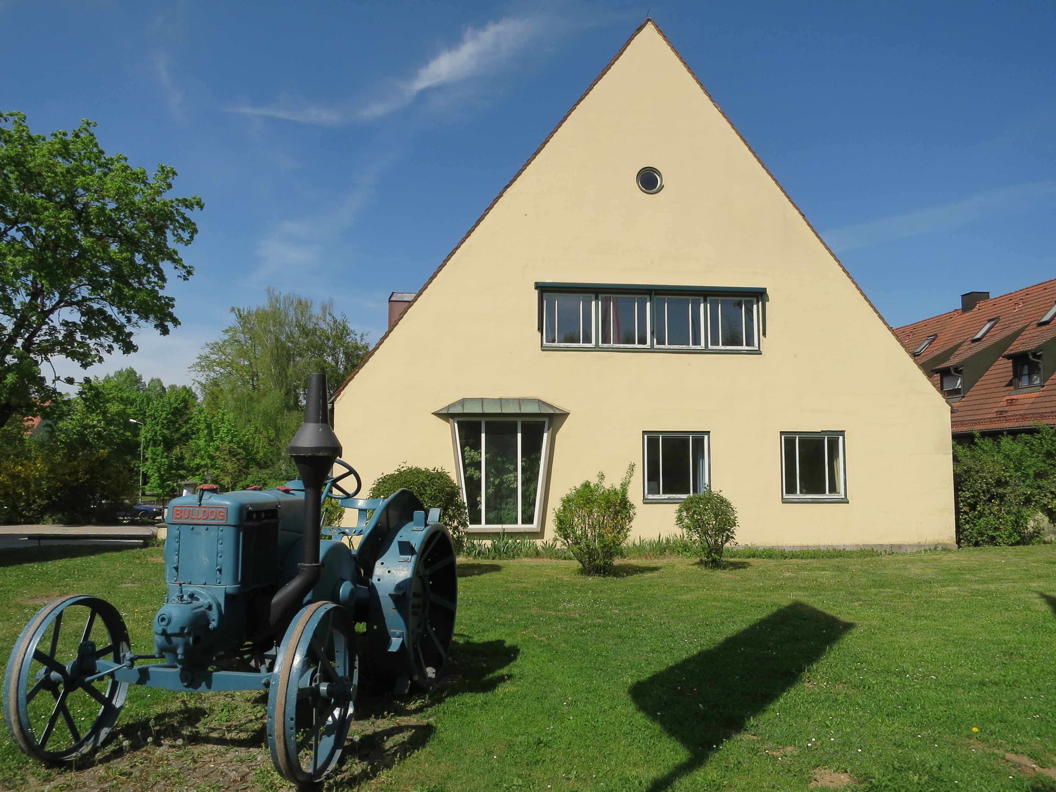 Bulldog vor alter Landtechnik